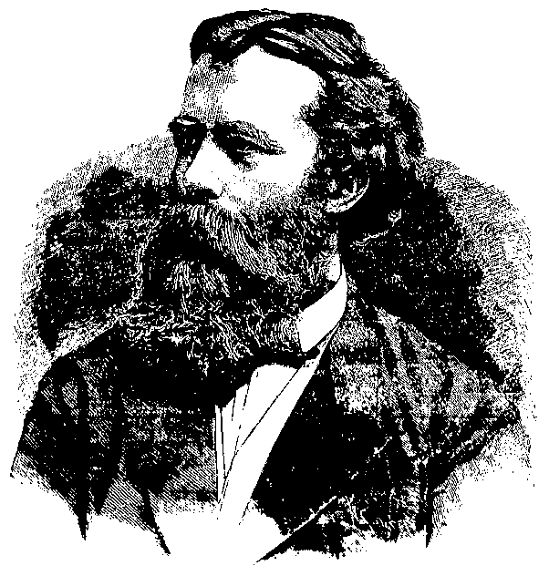 Statsråd Sofus Arctander.